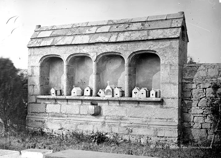 Ossuaire de l'église Saint-Pierre de Saint-Pol-de-Léon, photographié par Séraphin-Médéric Mieusement.